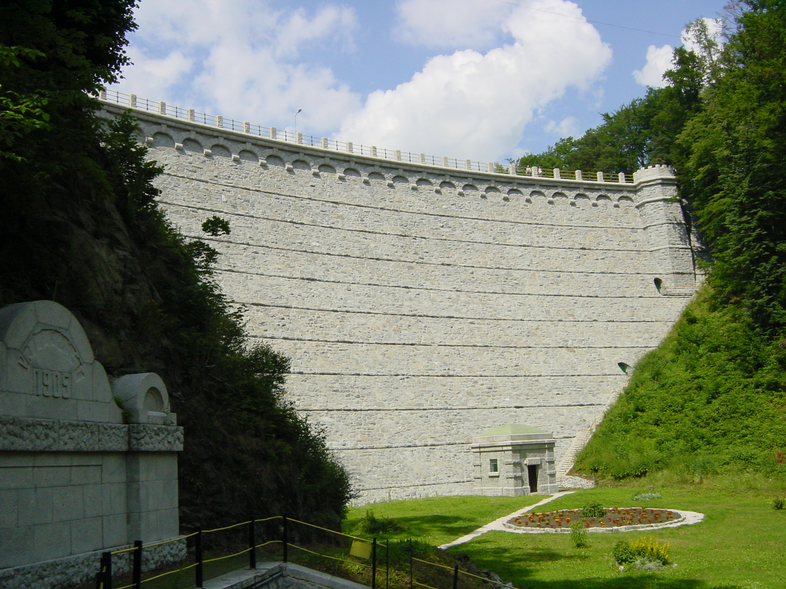 Marklissa-Talsperre (Marklissa dam in Poland)/Zapora Lesnianska